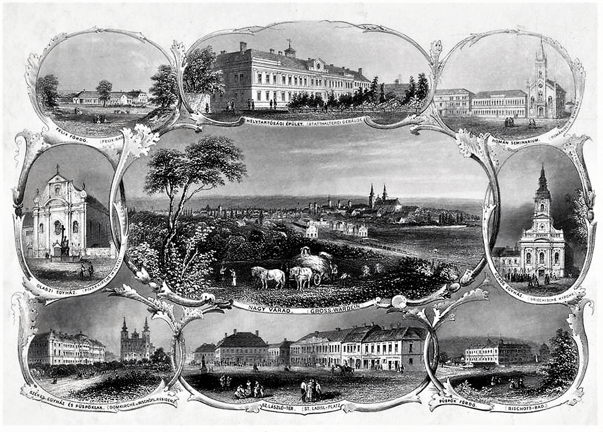 Stahlstich von Oradea, Souvenir-Blatt von 1850